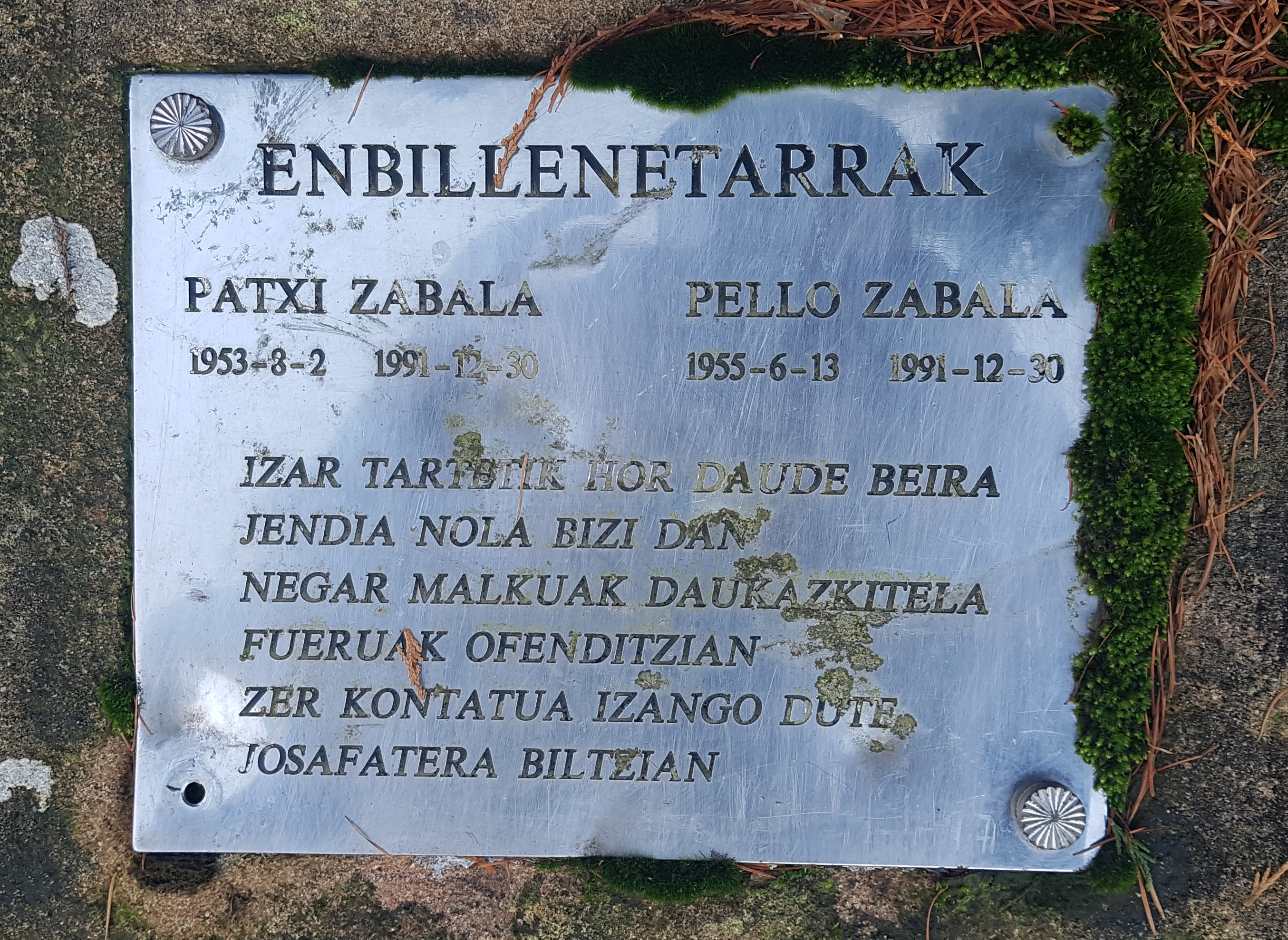 Istripuz hil ziren Usurbilgo Enbillenea baserriko Pello eta Patxi Zabalaren omenezko plaka Andatzako tontorrean dagoen errotarrian.